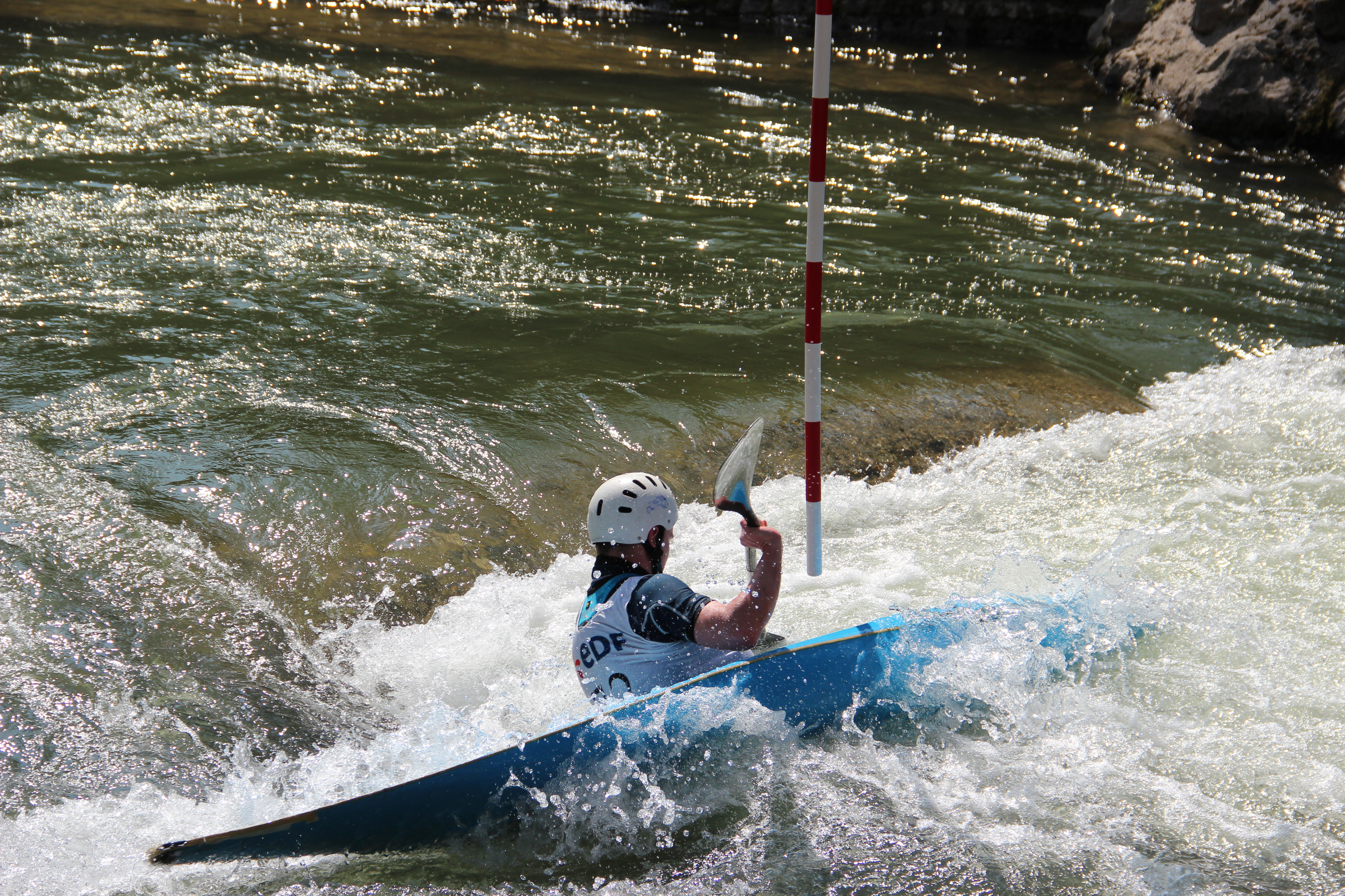 Slalom des Capitouls : Compétition de Nationale 2 de Canoë-Kayak. Île du Ramier, Toulouse.